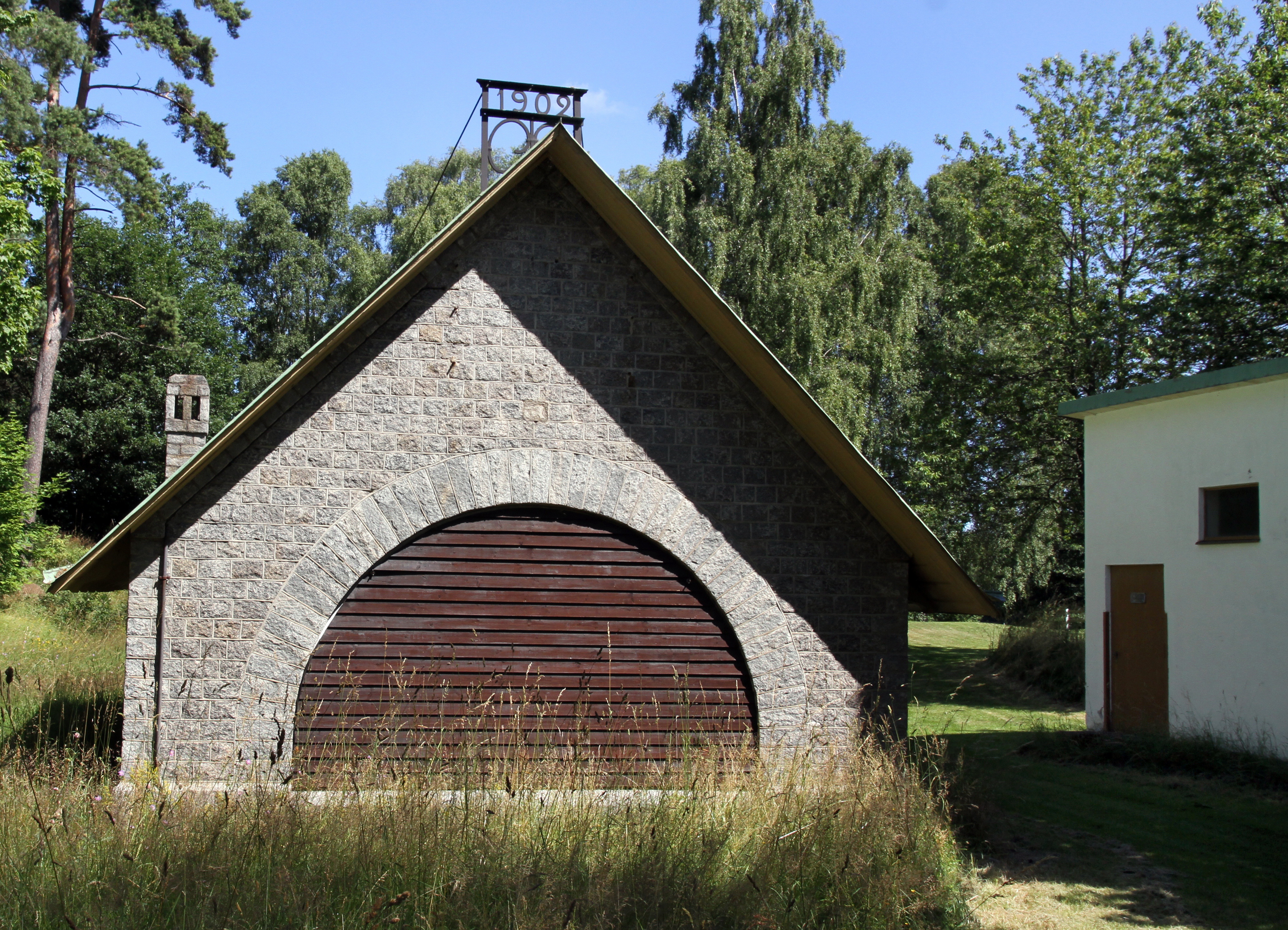 Froarps Vattenverk, Asarum, Karlshamn 17 juli 2015